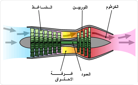 صورة تبيّن التدفق المحوري في التوربين